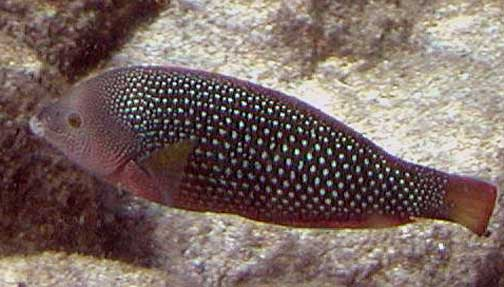 Anampses cuvier (Syn. Anampses cuvierià